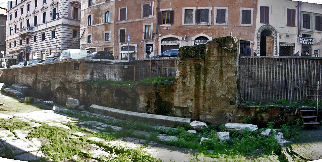 Roma, muro dei Saepta Iulia a fianco del Pantheon